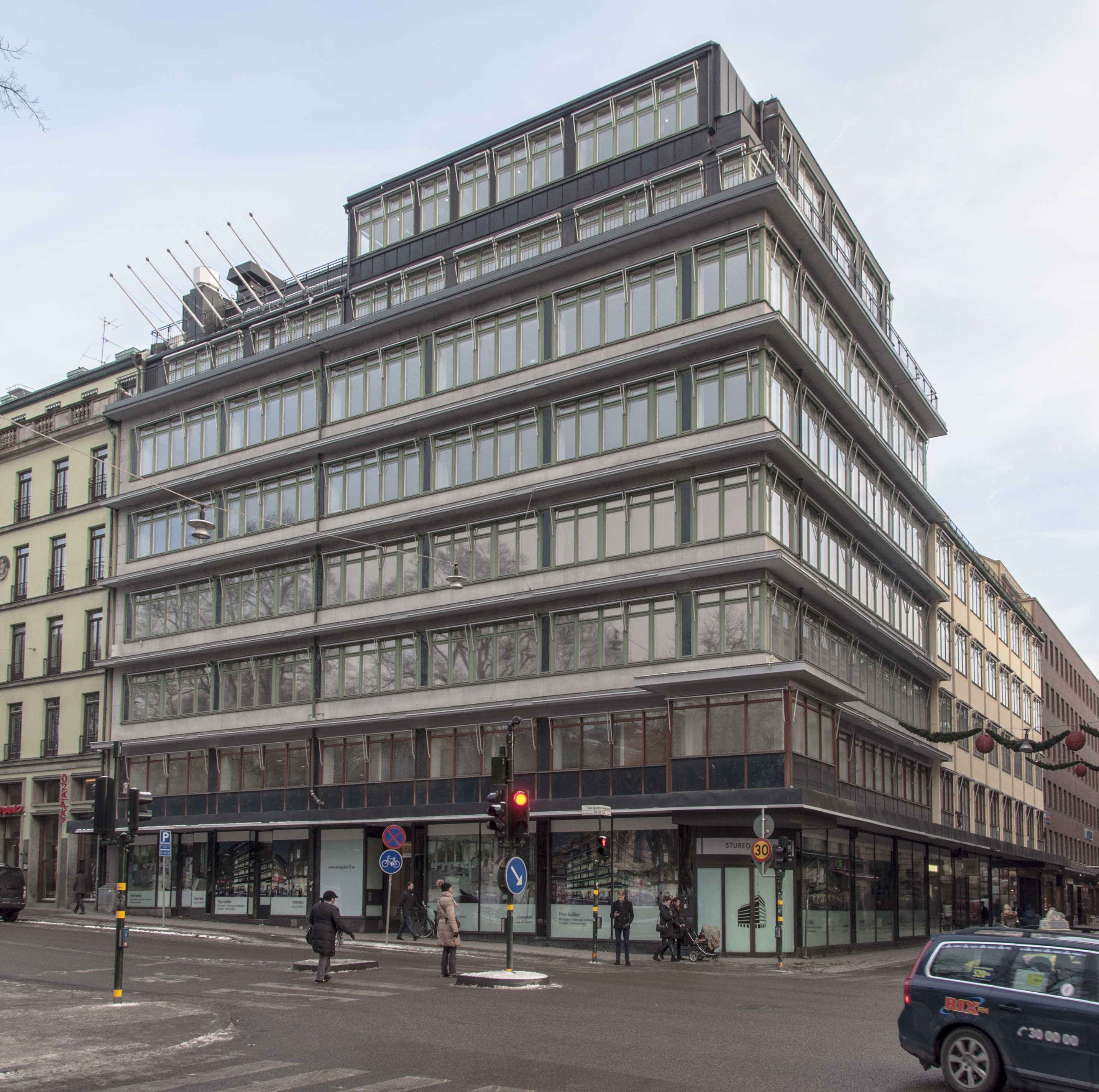 Humlegården 57, Humlegårdsgatan 22, Sturegatan 10, Nybyggnadsår 1928 - 1930 Björn Hedvall (Arkitekt) G. Kjellberg (Byggherre) Gumpel & Bengtsson (Byggmästare)